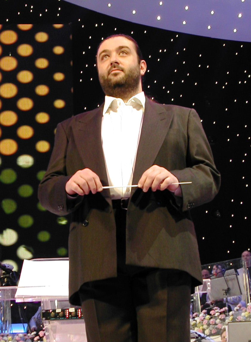 Immagine del cantante e musicista Massimo Morini fornita dallo stesso artista per Commons